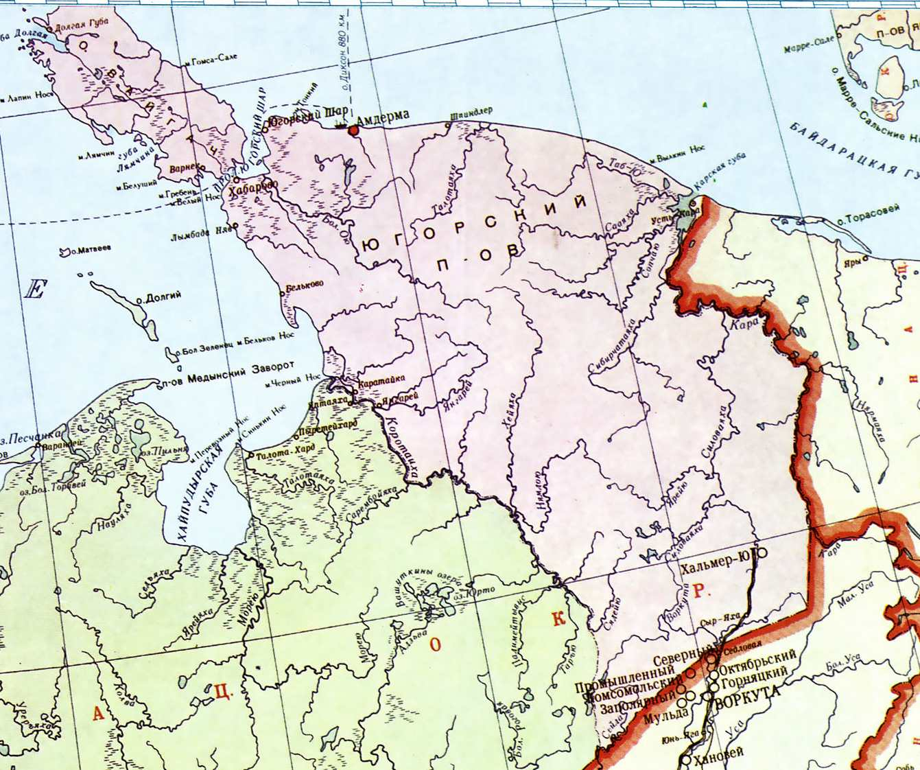 Карта Амдерминского района